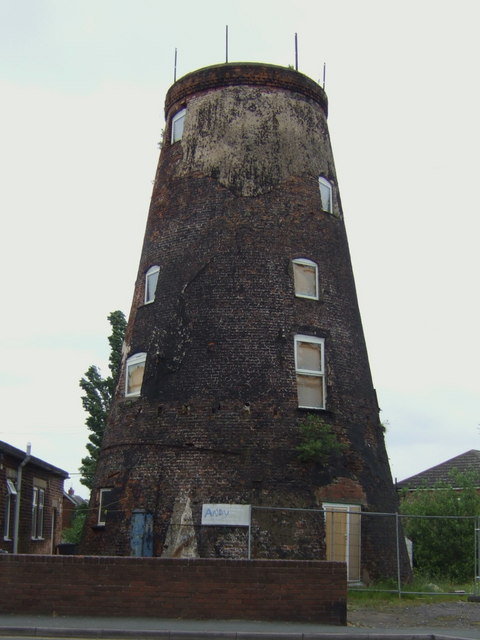 Disused Windmill